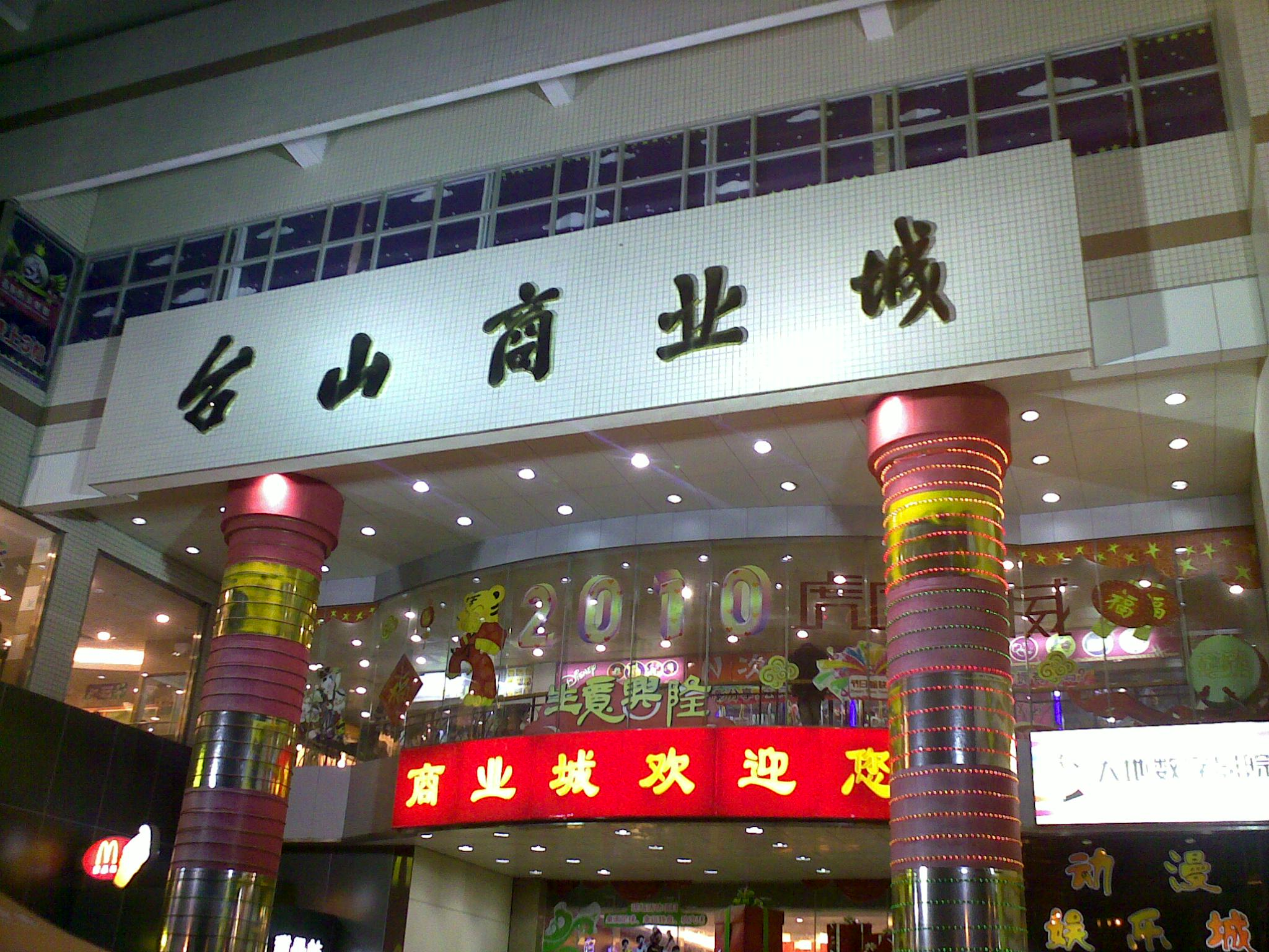 粵語: 廣東台山商業城